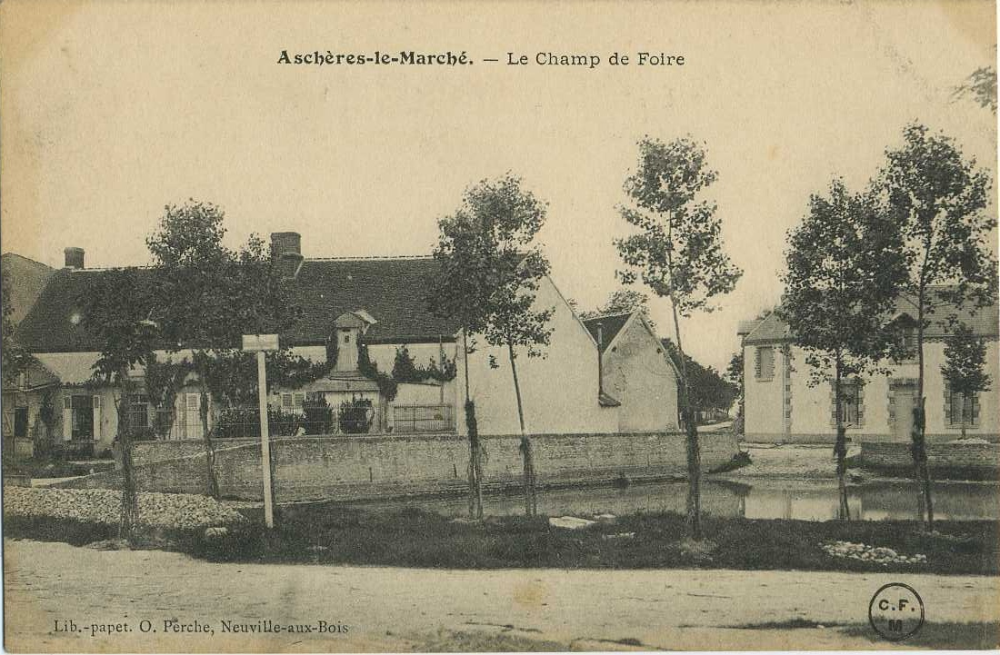 Carte postale ancienne Le champ de foire d'Aschères-le-Marché, Loiret, France